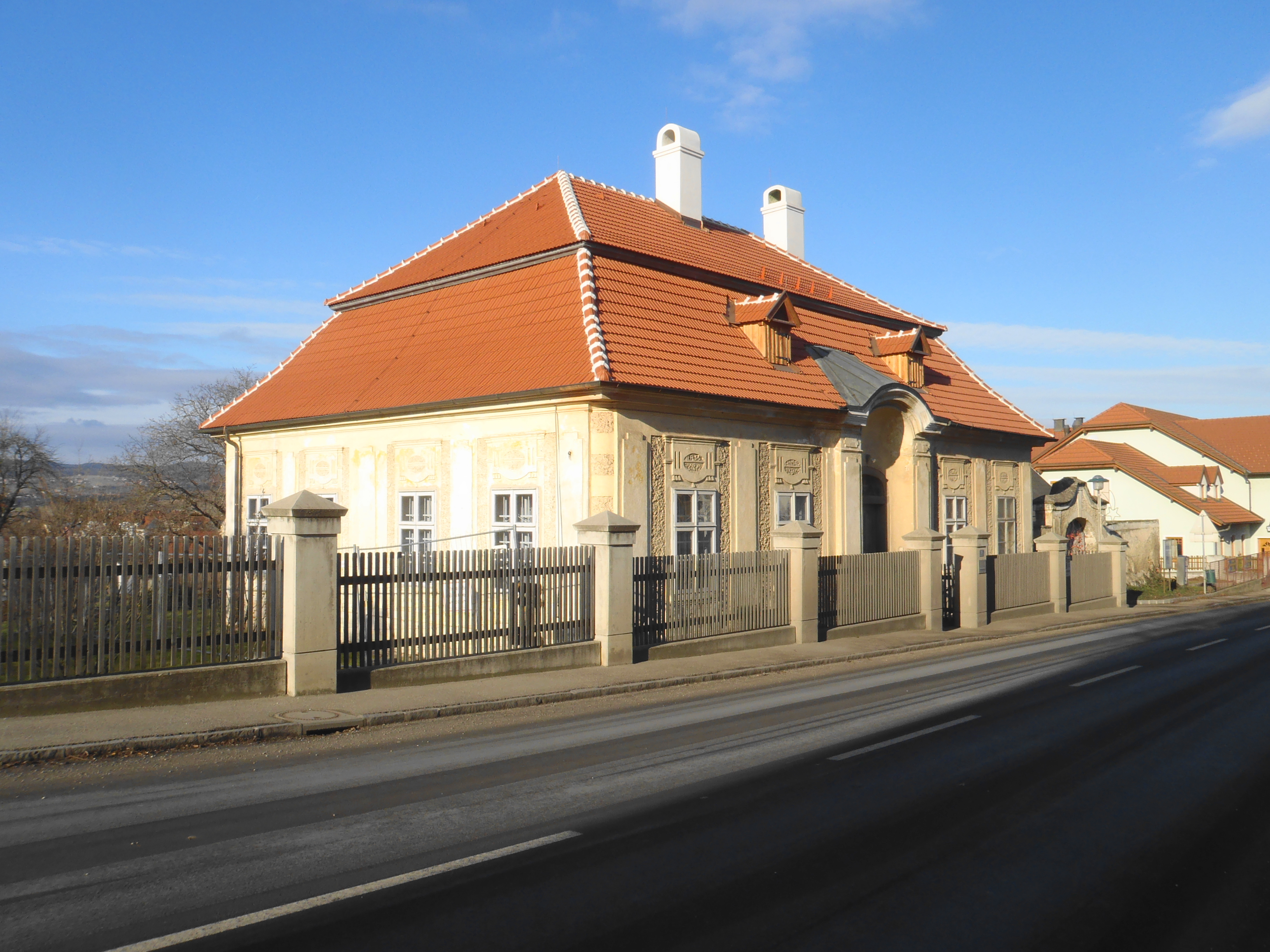 Pfarrhof